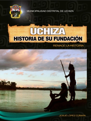 Portada del libro Uchiza, historia de su fundación.